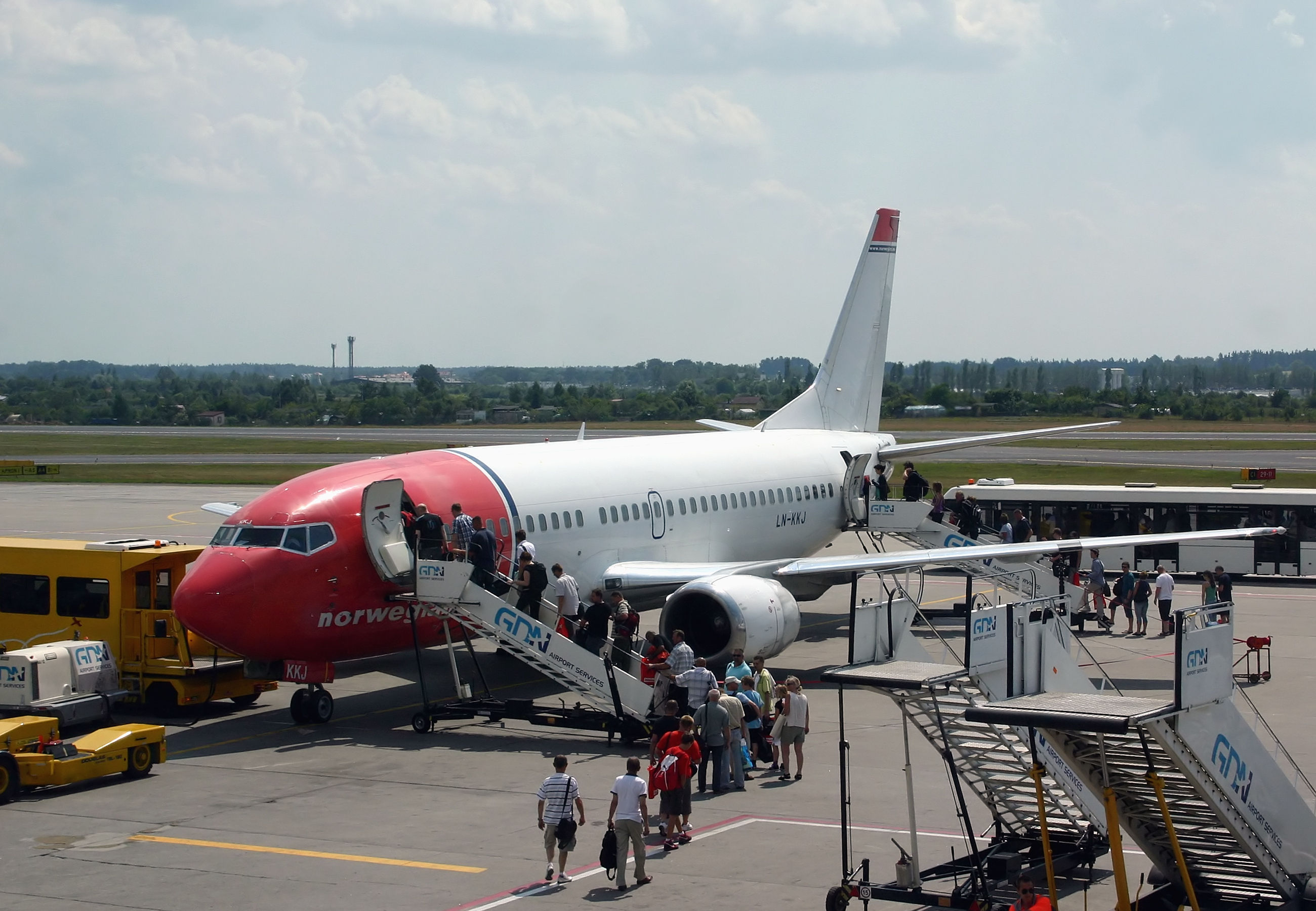 Norwegian Air Shuttle, Boeing B737-300, Registrierung LN-KKJ, auf dem Flughafen von Danzig (Gdańsk) beim Boarding.